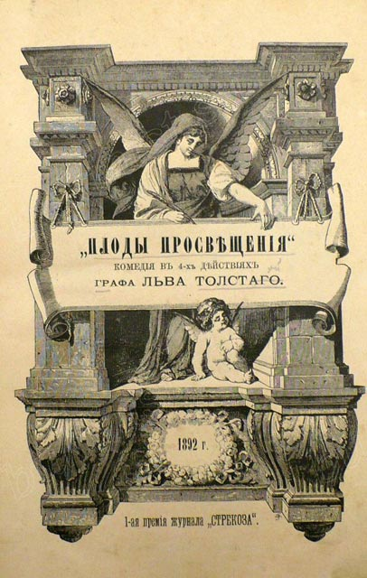 Leo Tolstoy . Cover of the book The Fruits of Enlightenment , 1892